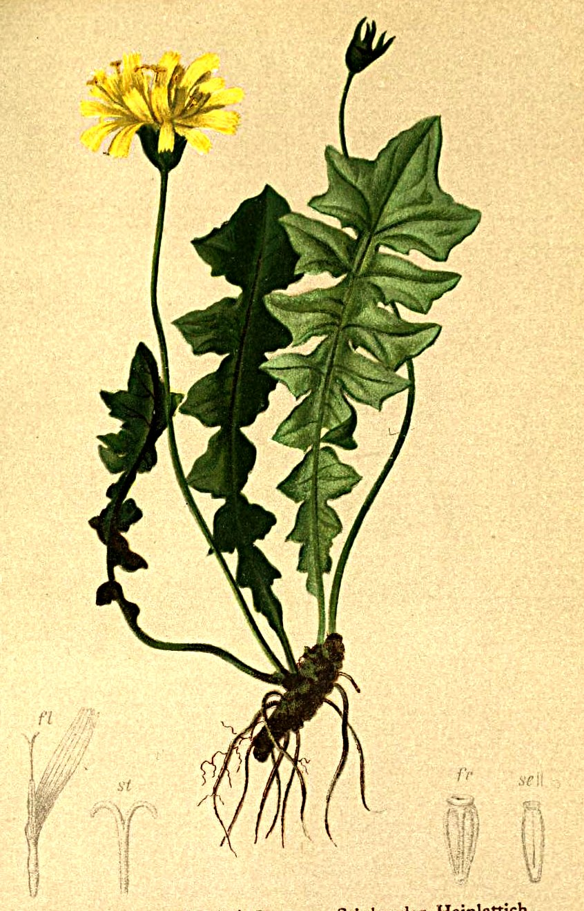 Aposeris foetida